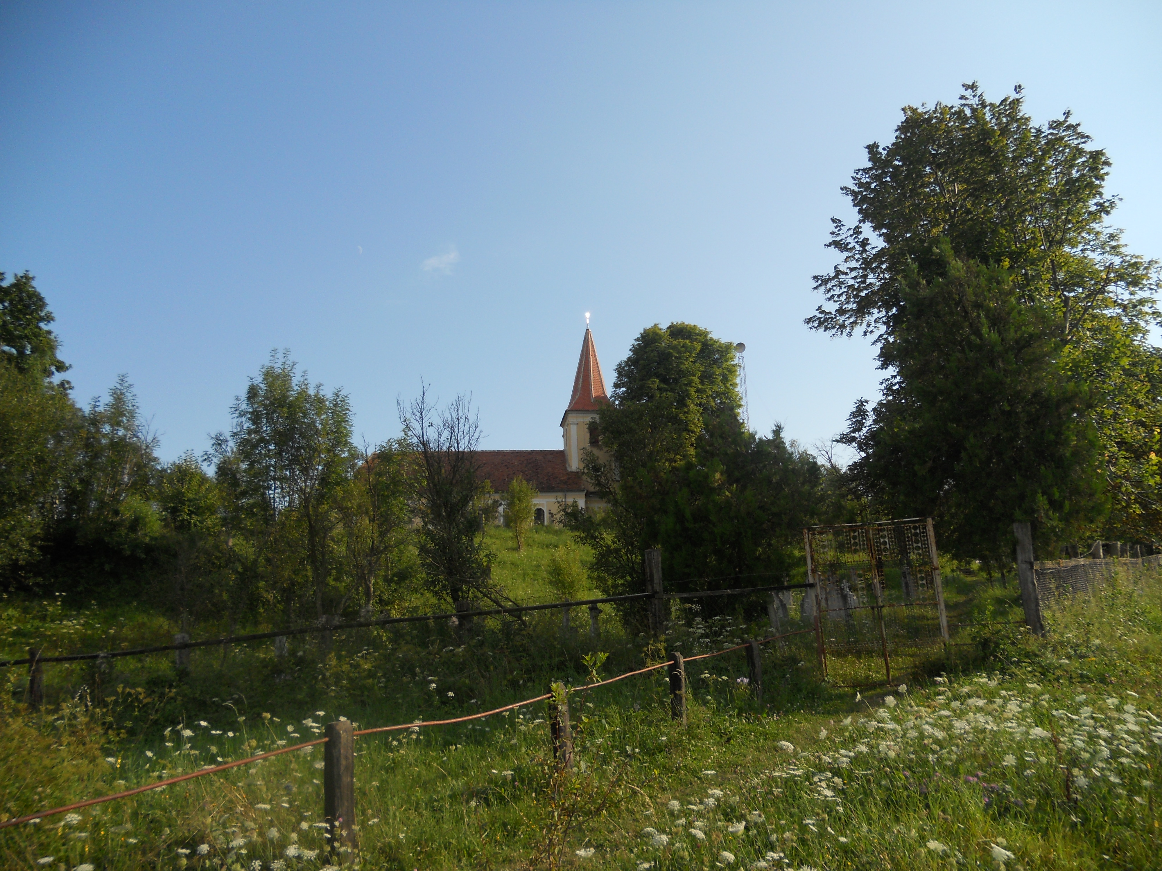 Biserica Ortodoxă Sf.Vasile din Fofeldea